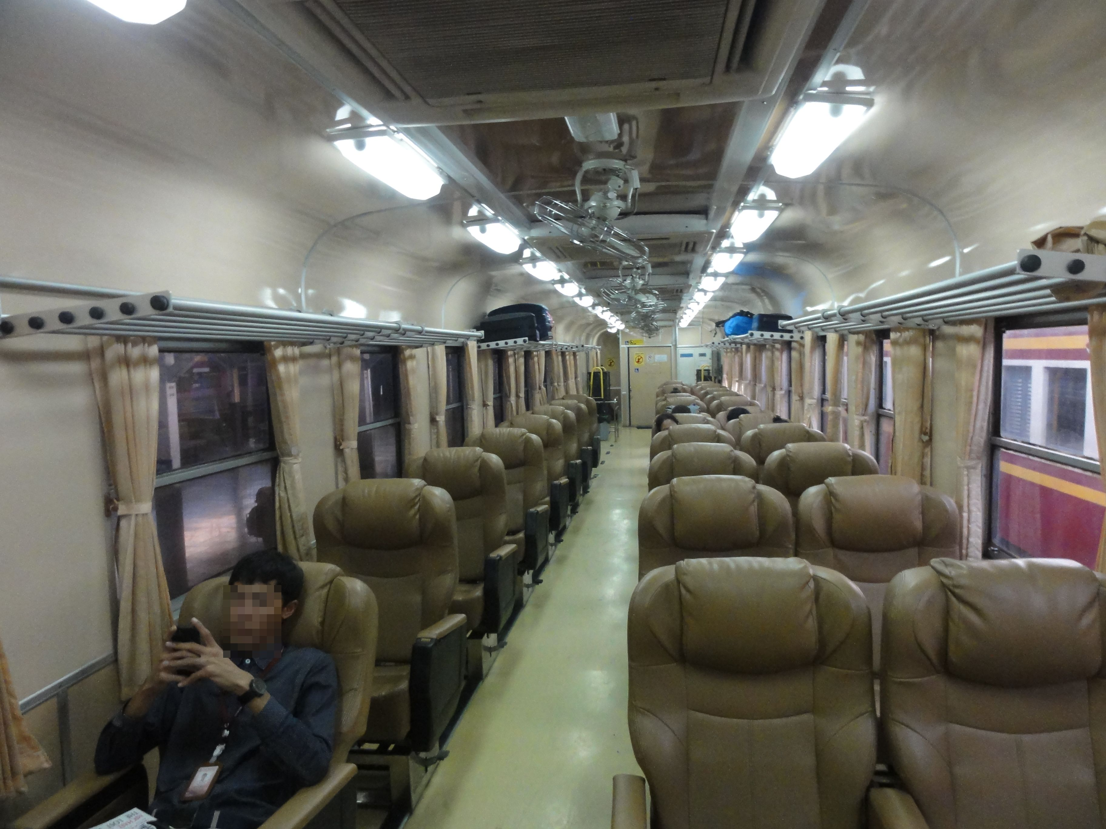 タイ国鉄オハ12車いす対応改造車・車内